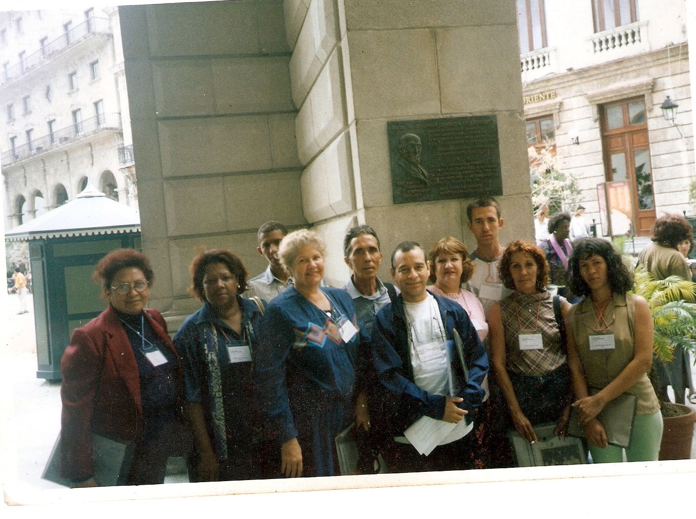 Kubaj esperantistoj antaŭ la memortabulo al Zamenhof en Havano dum la 5-a nacia Esperanto-kongreso en 2005.